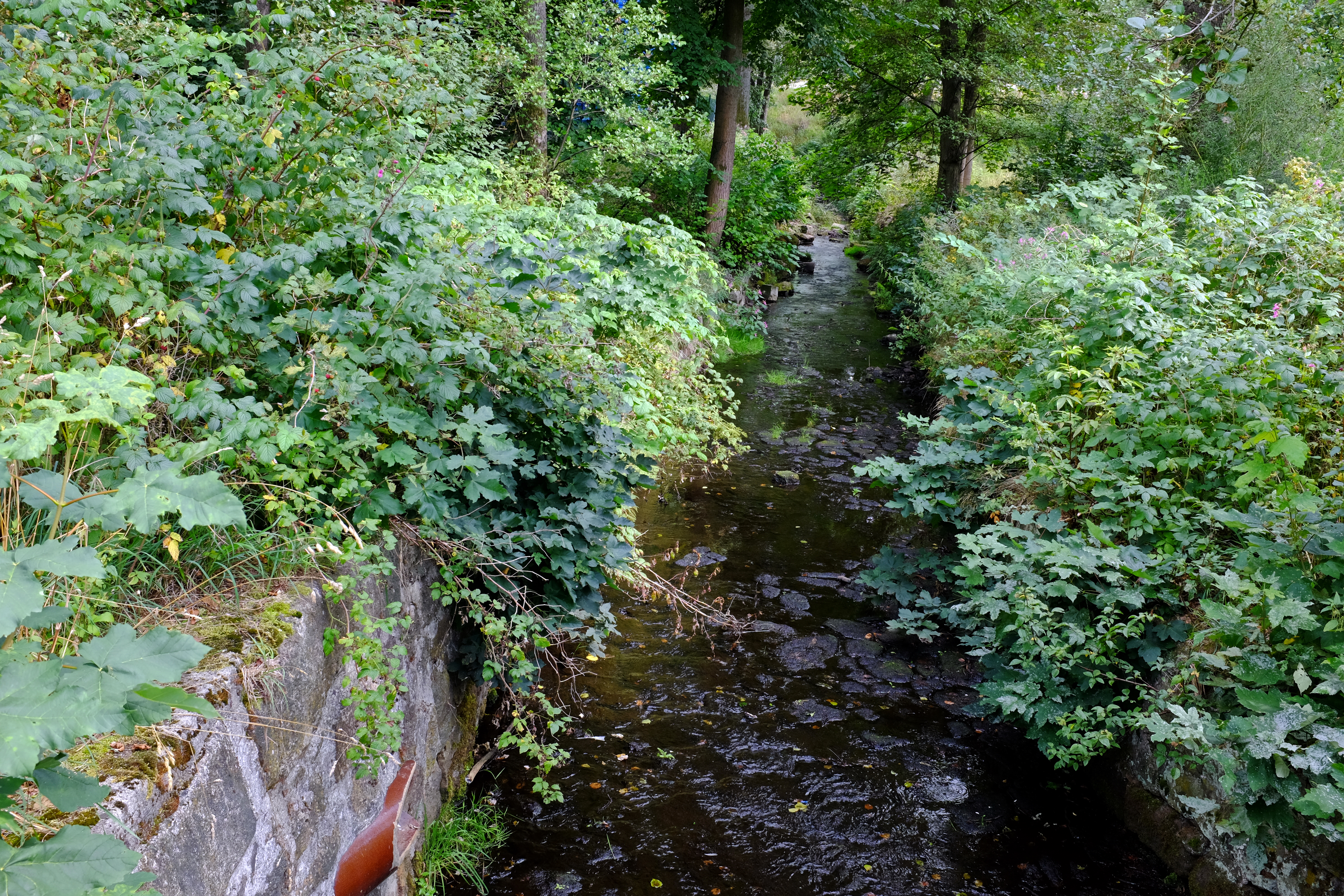 Nejdecký potok v Nejdku, Krušné hory, okres Karlovy Vary